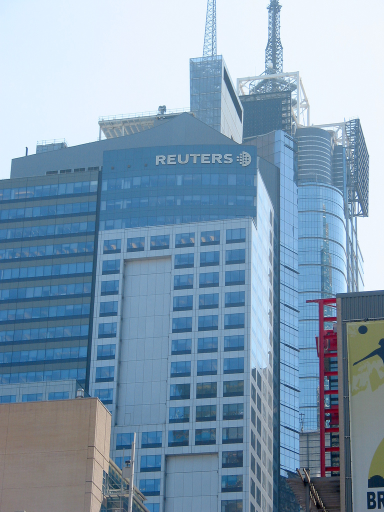 Edificio de la agencia periodistica Reuters